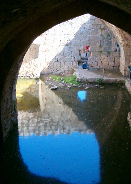 בריכת מים במבצר נמרוד Nimrod Fortress pool